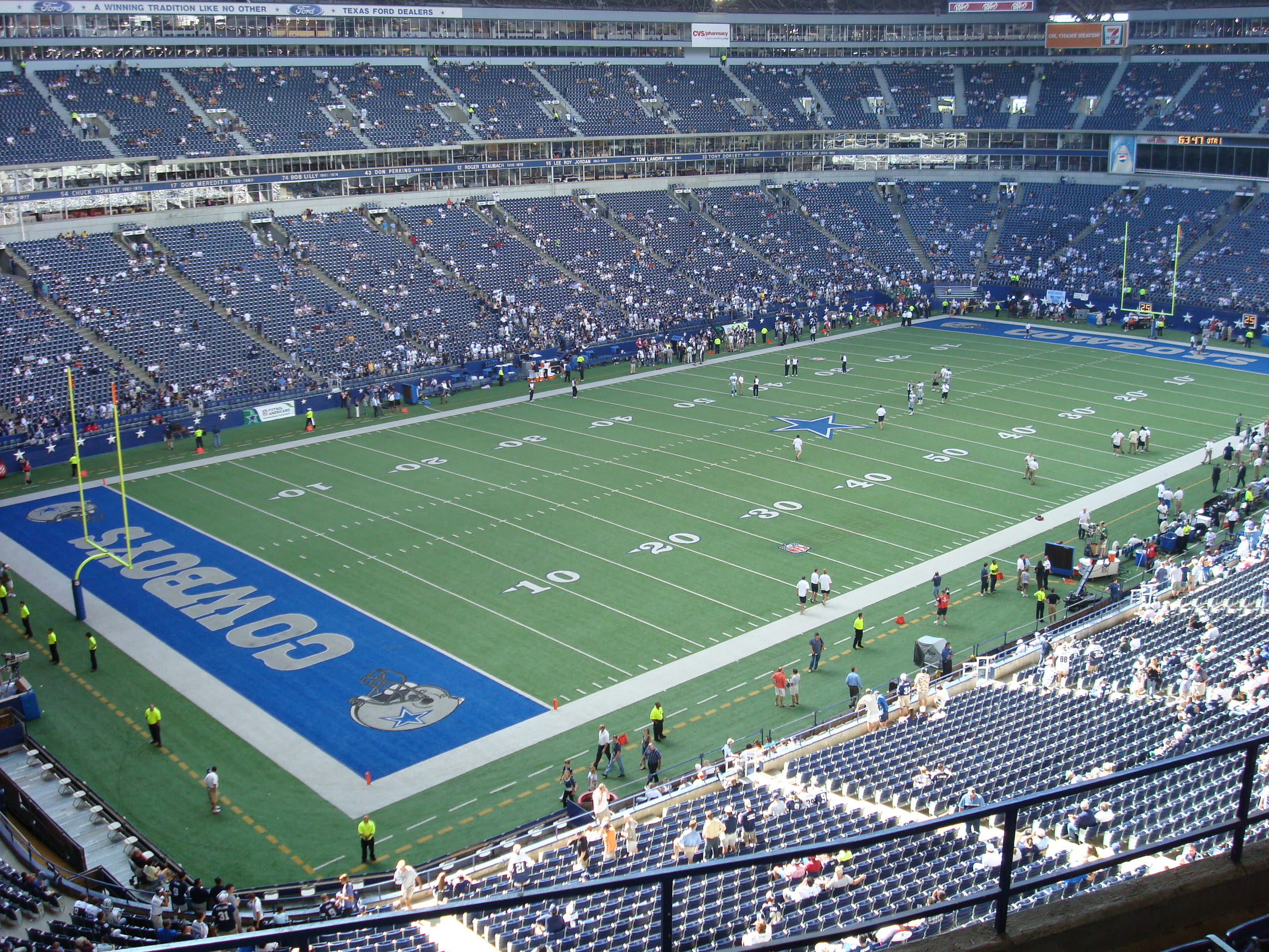 Vista interior del Texas Stadium